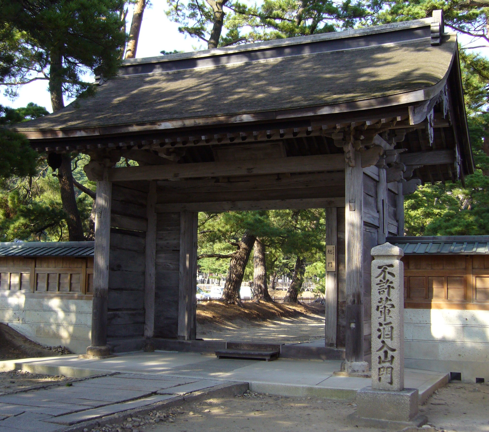 Photograph of Tentokuji temple in Akita, Akita prefecture, Japan. / 天徳寺（秋田県秋田市）